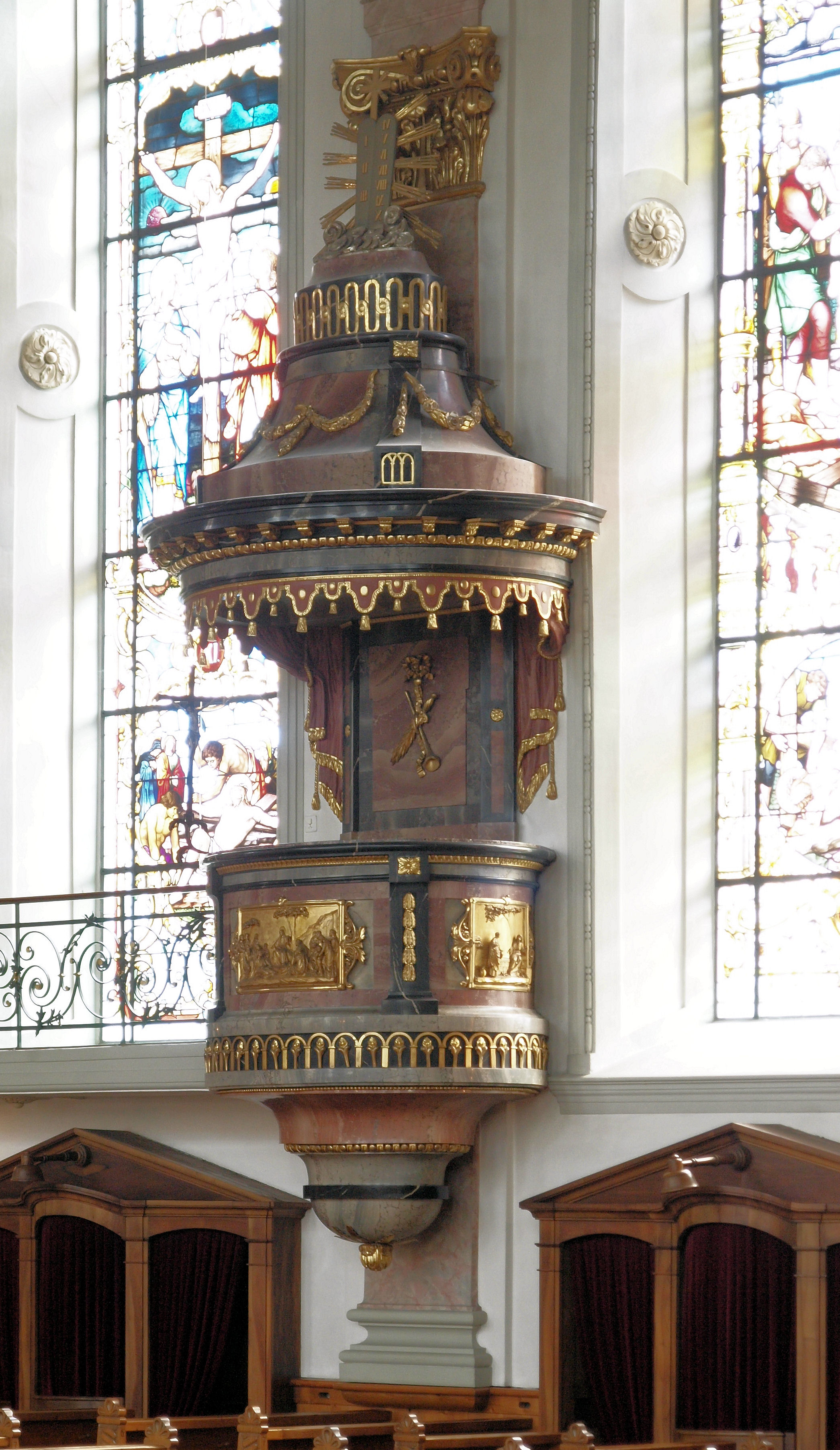 Die Kanzel der Pfarrkirche St. Mauritius in Appenzell. Die Kanzel ist ein Werk von Joseph Mossbrugger, und wurde im Advent 1825 hergestellt